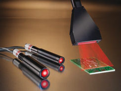 Linienlaser mit Wechselobjektiven